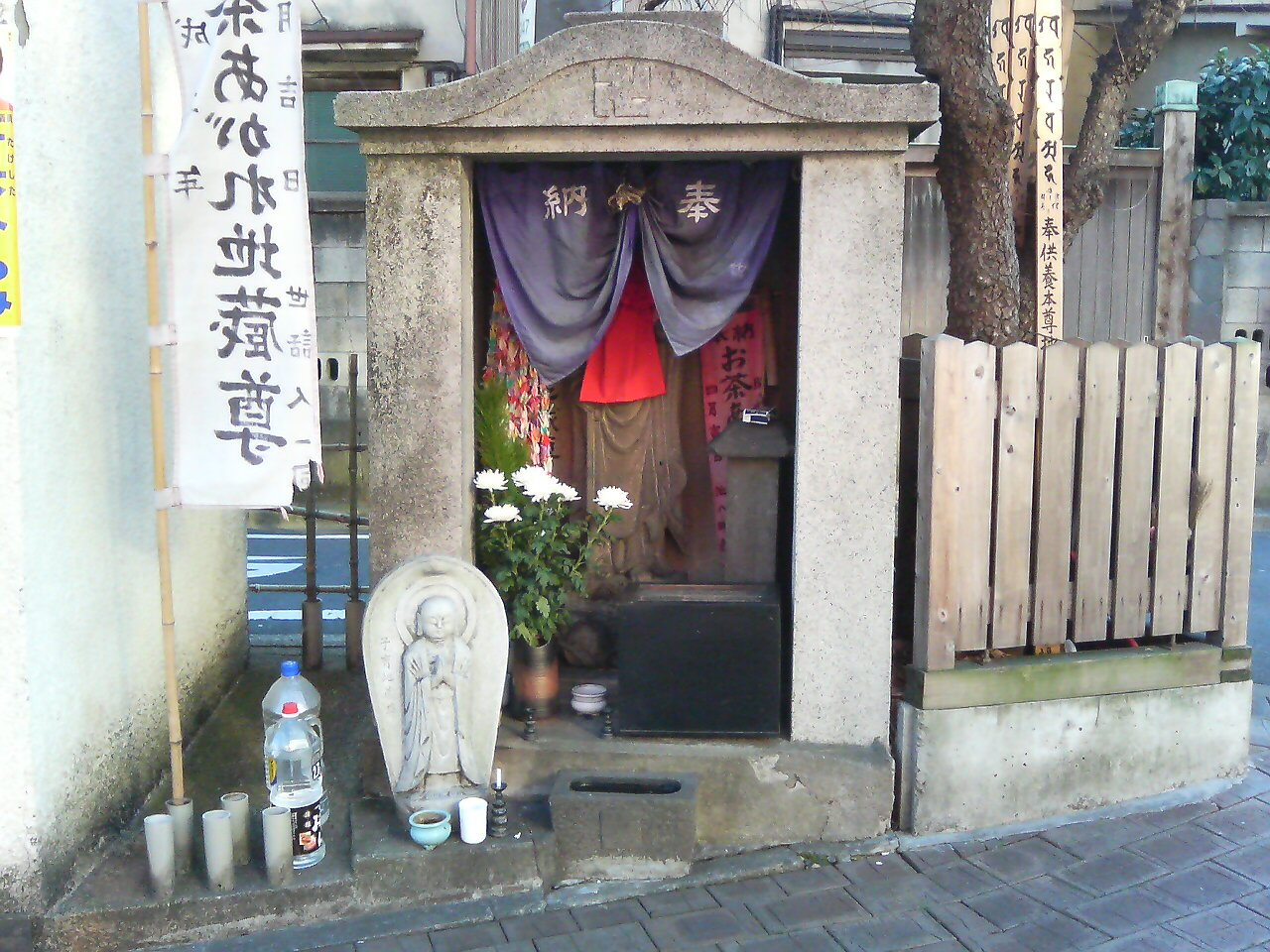 Ocha-agarejizo in kamikebukuro,tokyo